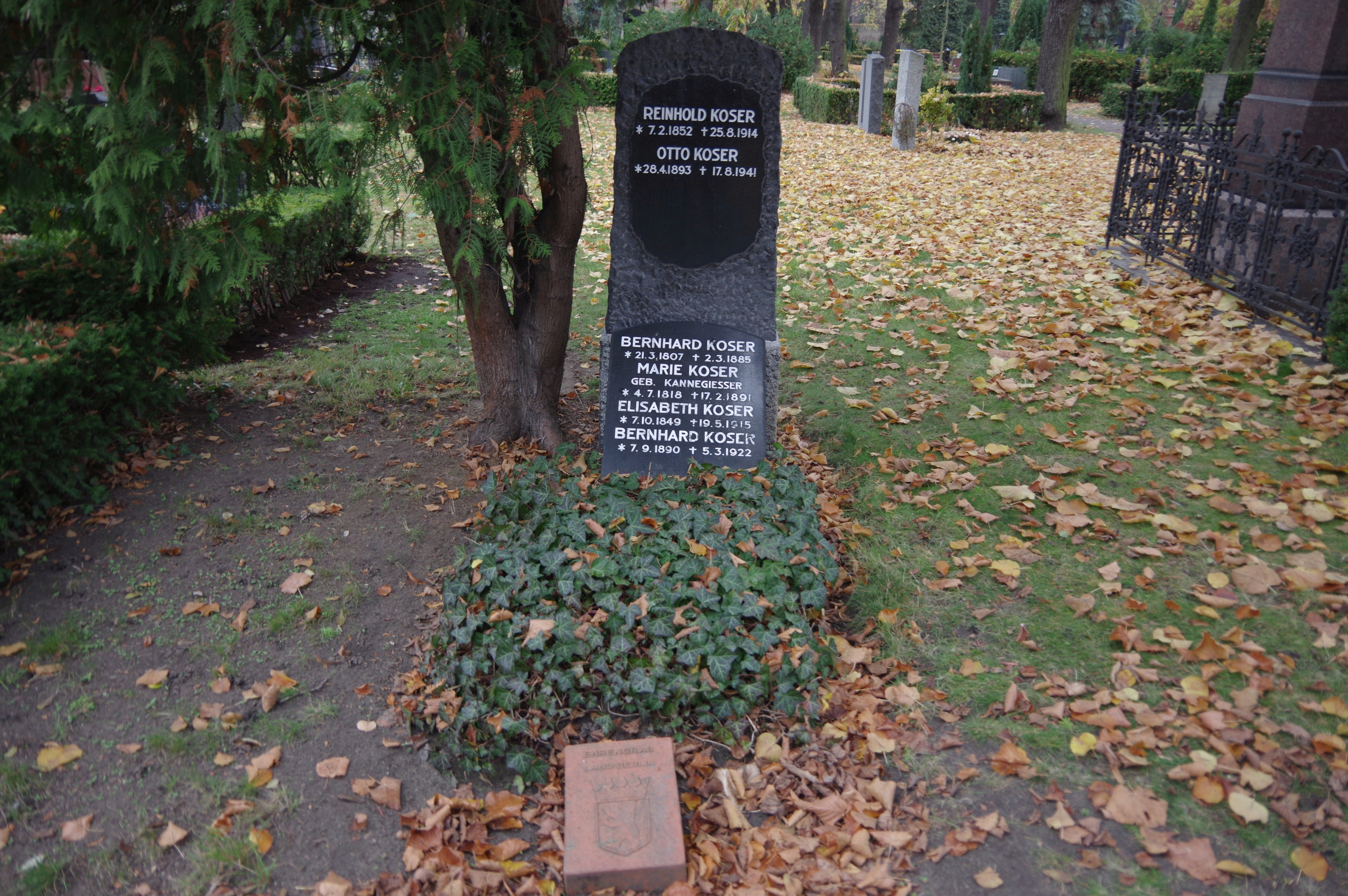 Der Alter Zwölf-Apostel-Kirchhof in Berlin-Schöneberg. Der Friedhof ist denkmalgeschützt.